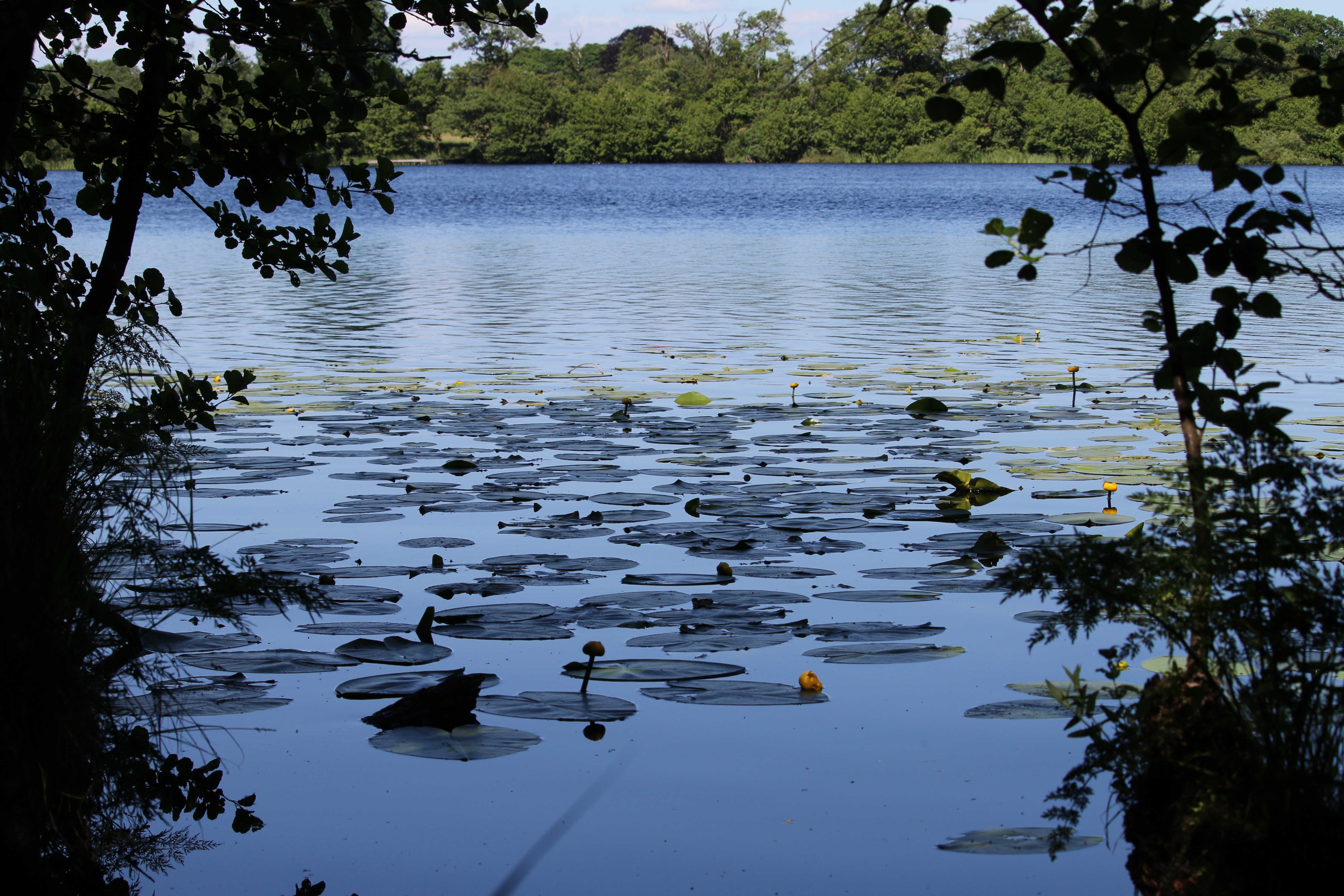 Eksholmssjön